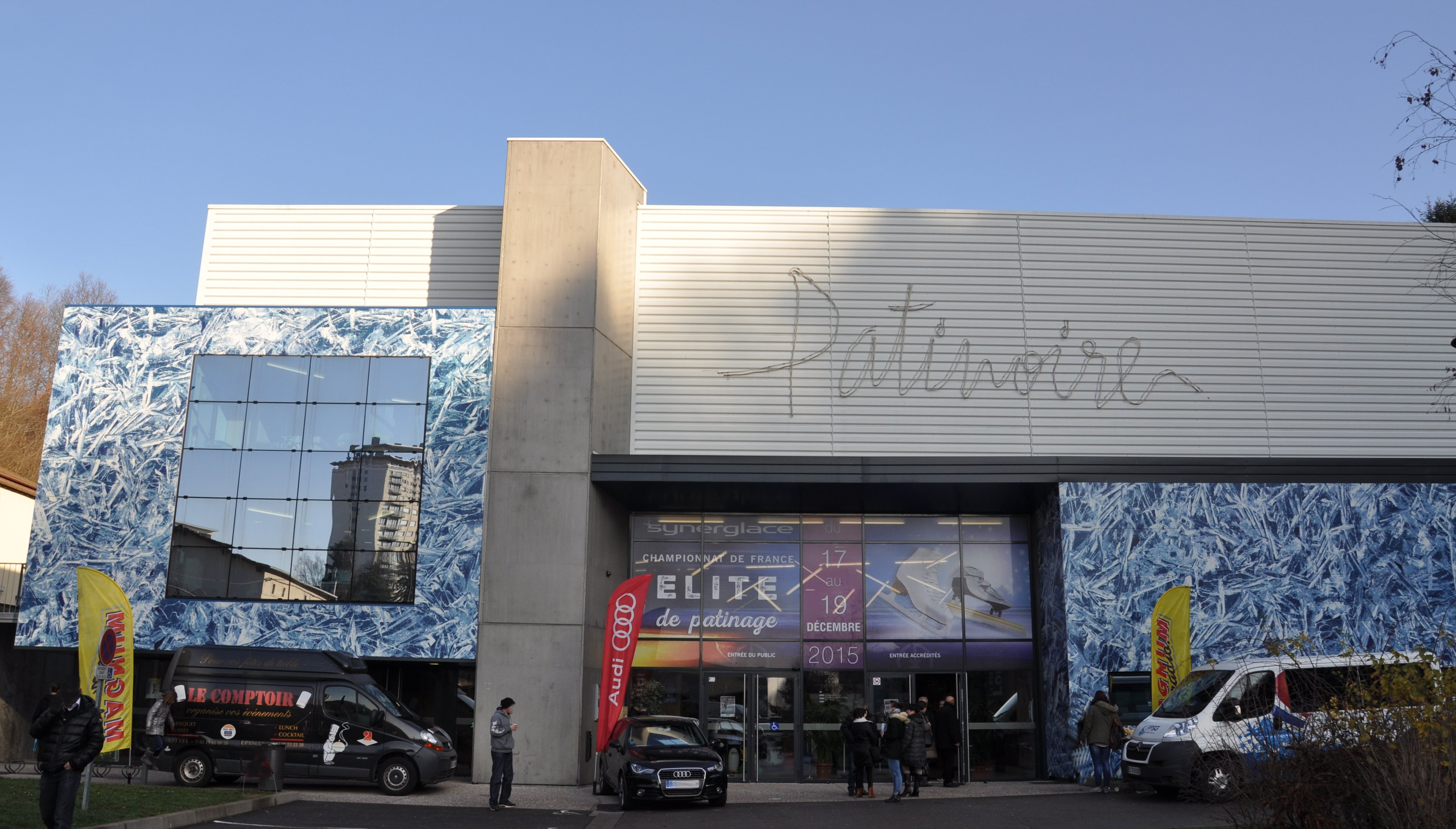 Entrée de la patinoire d'Epinal dans les Vosges